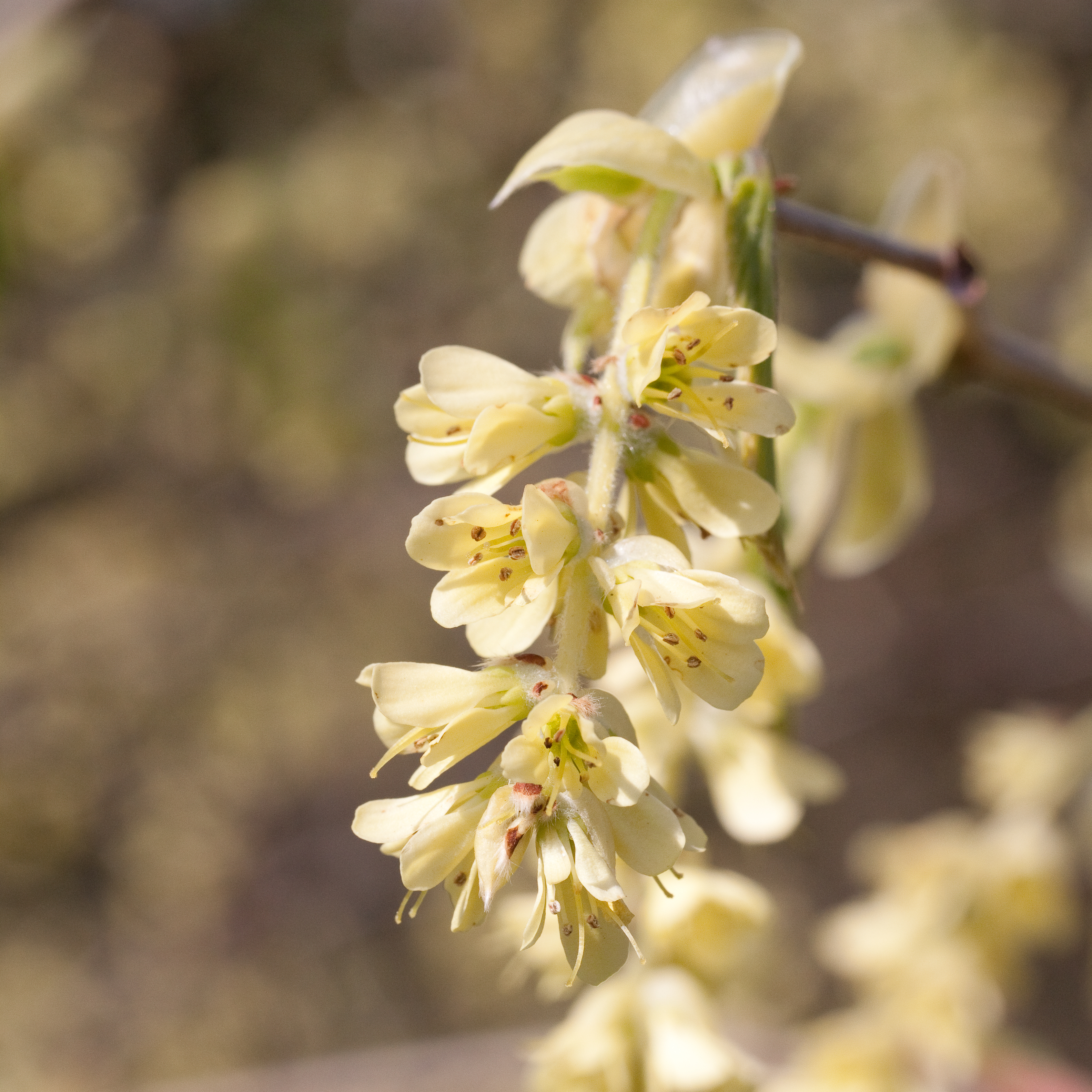 Fleur de Corylopsis glabrescens - Jardin botanique de Strasbourg - France